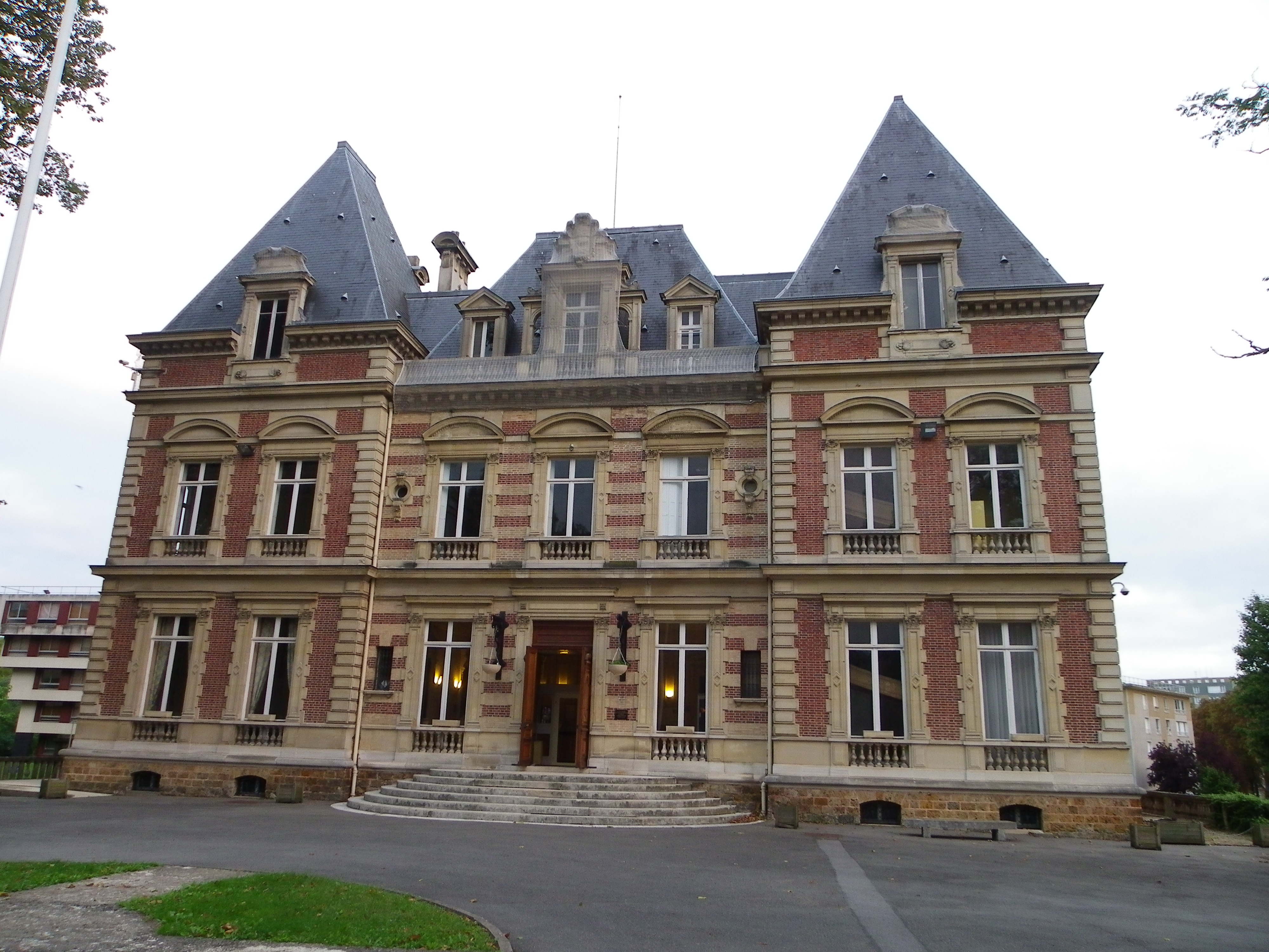 Façade du château des Bergeries à Draveil (Essonne, Île-de-France, France).